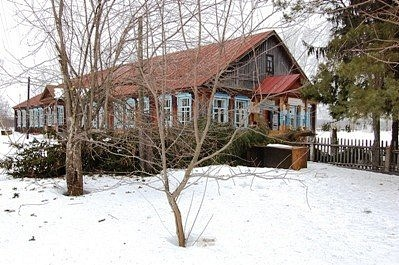 Школа Тойси-Парзуси